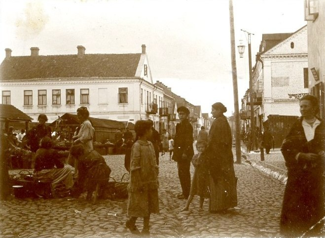 Рыбны рынак у Гродна, Беларусь. Далей бачна вуліца Вялікая Траецкая. Здымак пачатку 20 ст.